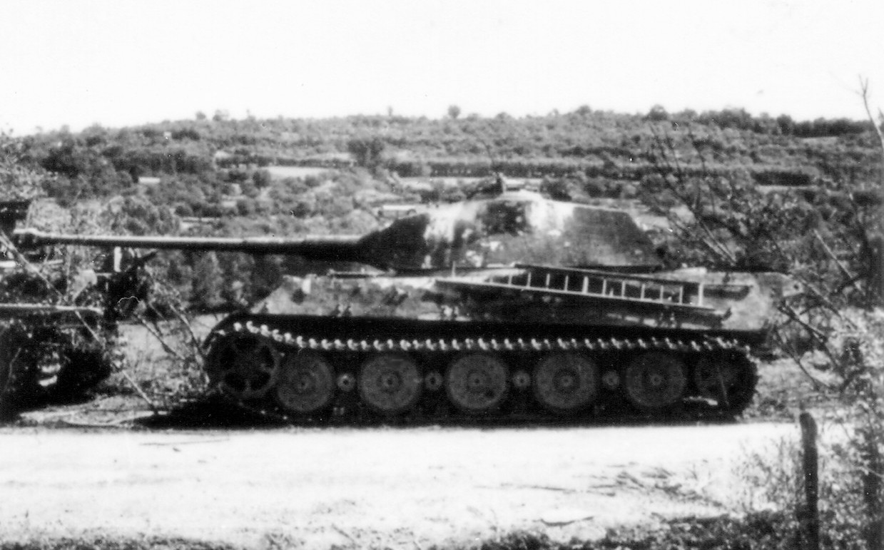 Deutscher Tiger II Panzer mit dem seltenen Porscheturm nahe Vimoutiers, Juni/Juli 1944